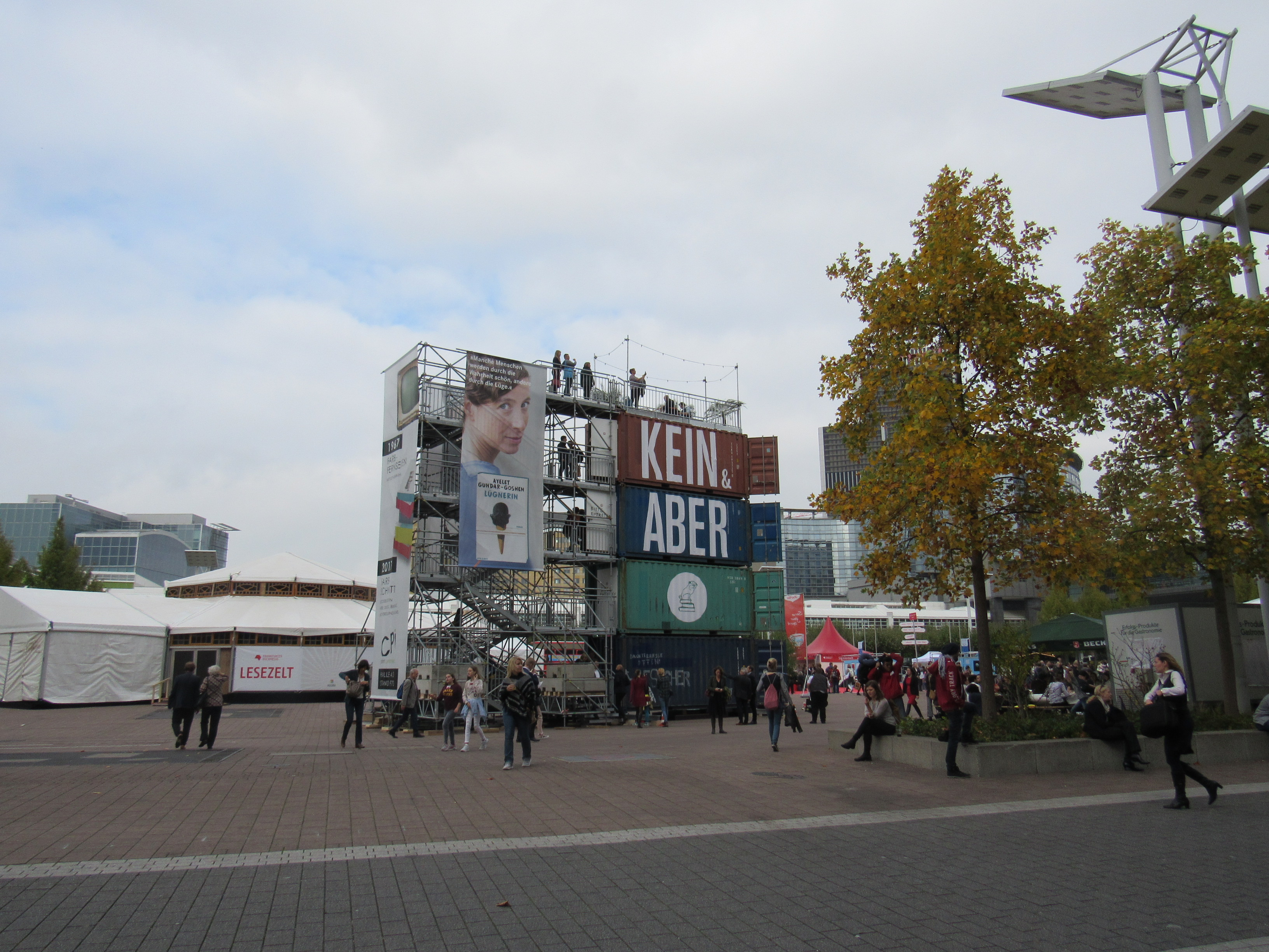 Kein & Aber, Schweizer Buchverlag, Messestand auf der Frankfurter Buchmesse 2017 The making of this document was supported by the Community-Budget of Wikimedia Germany.